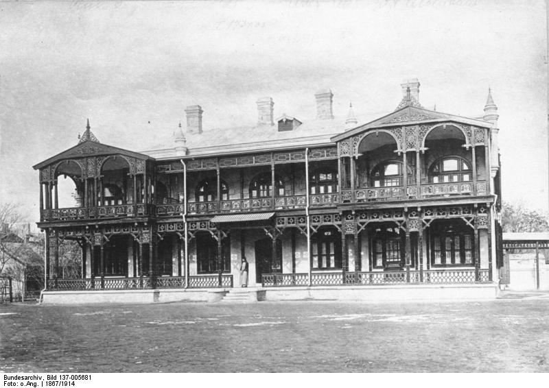 China, Peileiks Sommersitz von Peking:, Haus der deutschen Gesandtschaft